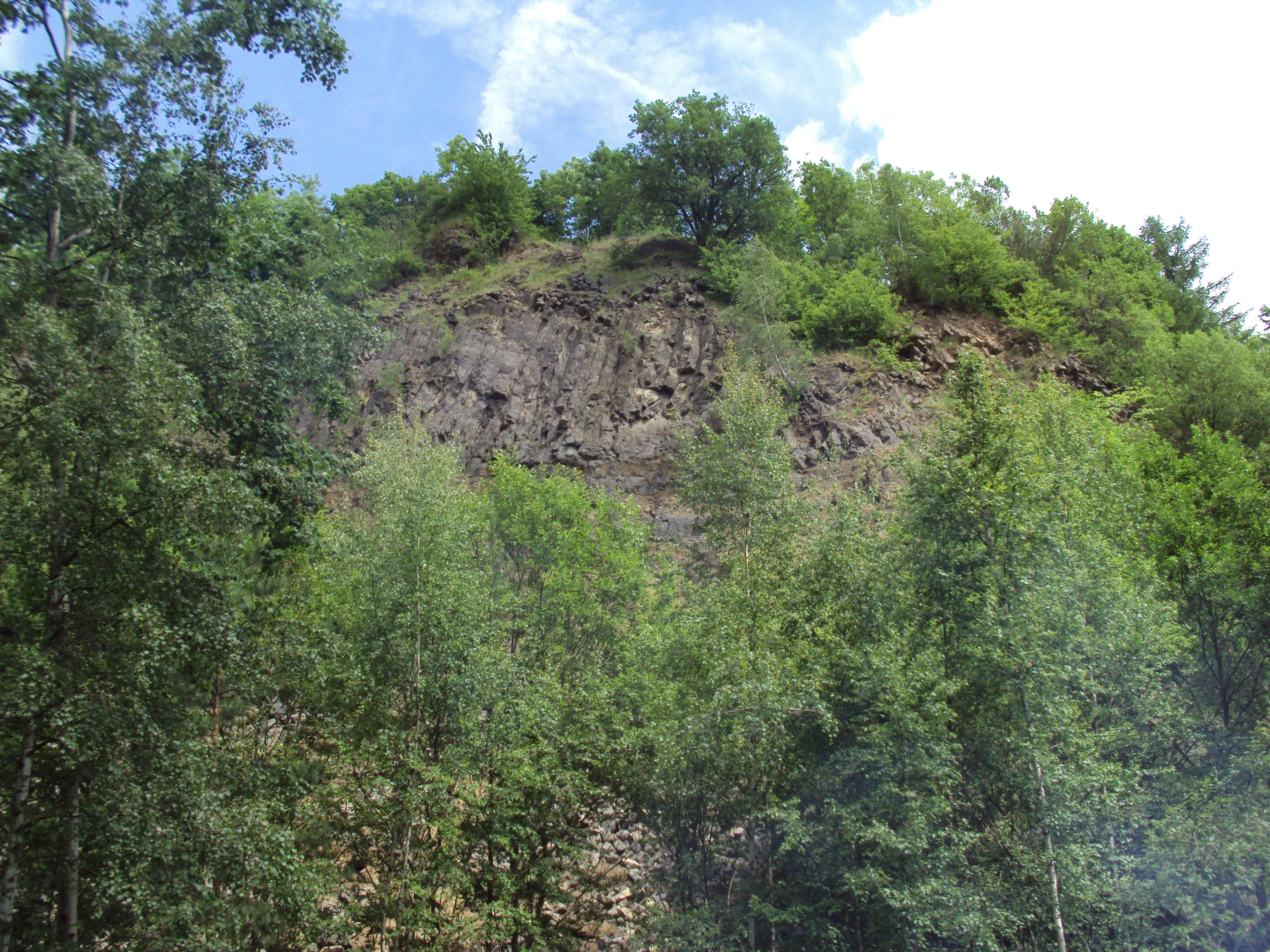 Česky: Zarostlý bývalý lom v Kamenickém kopci u Zákup